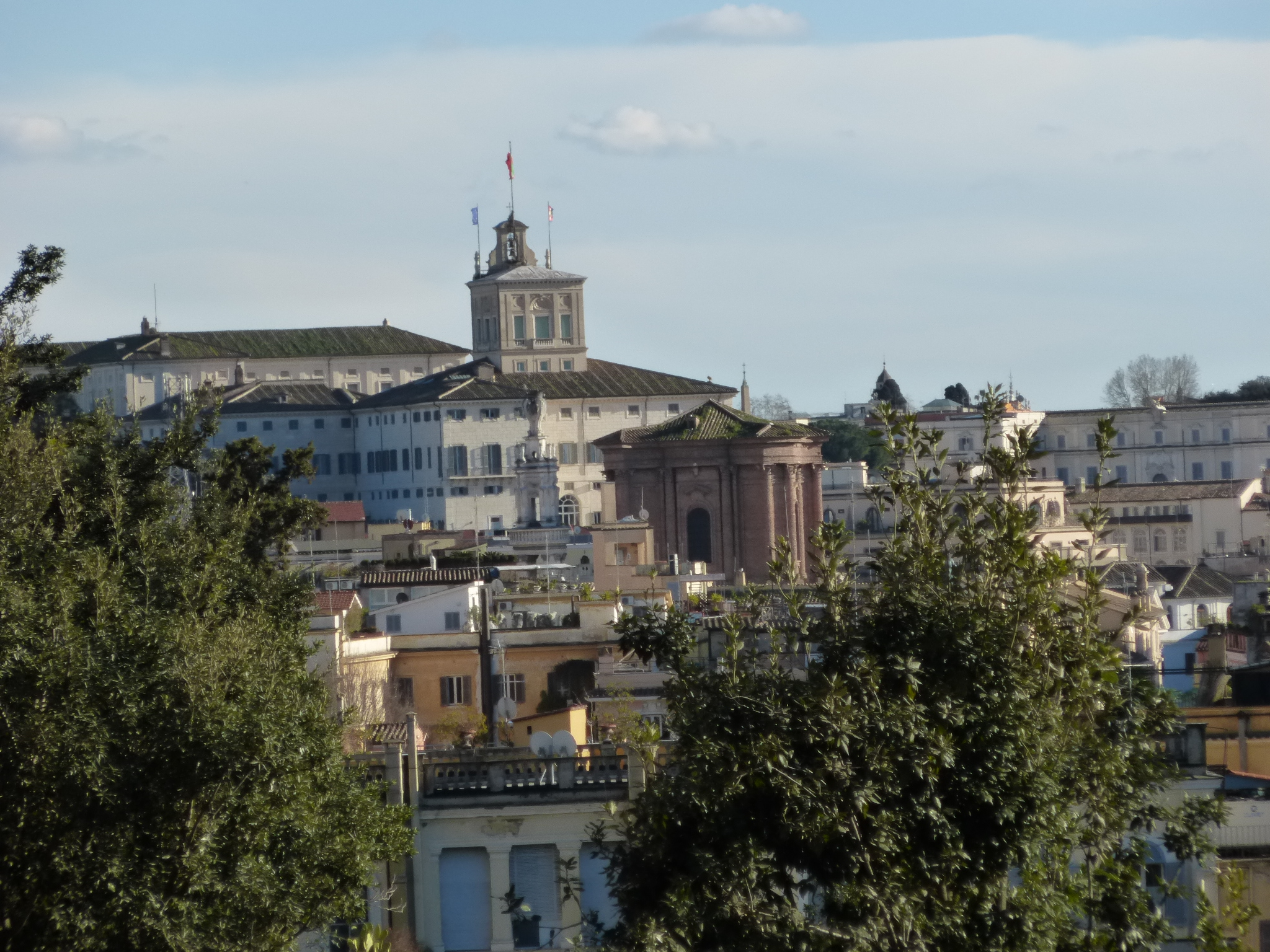 Vista su Trevi dal Pincio. in primo piano S. Andrea delle Fratte, dietro il Quirinale